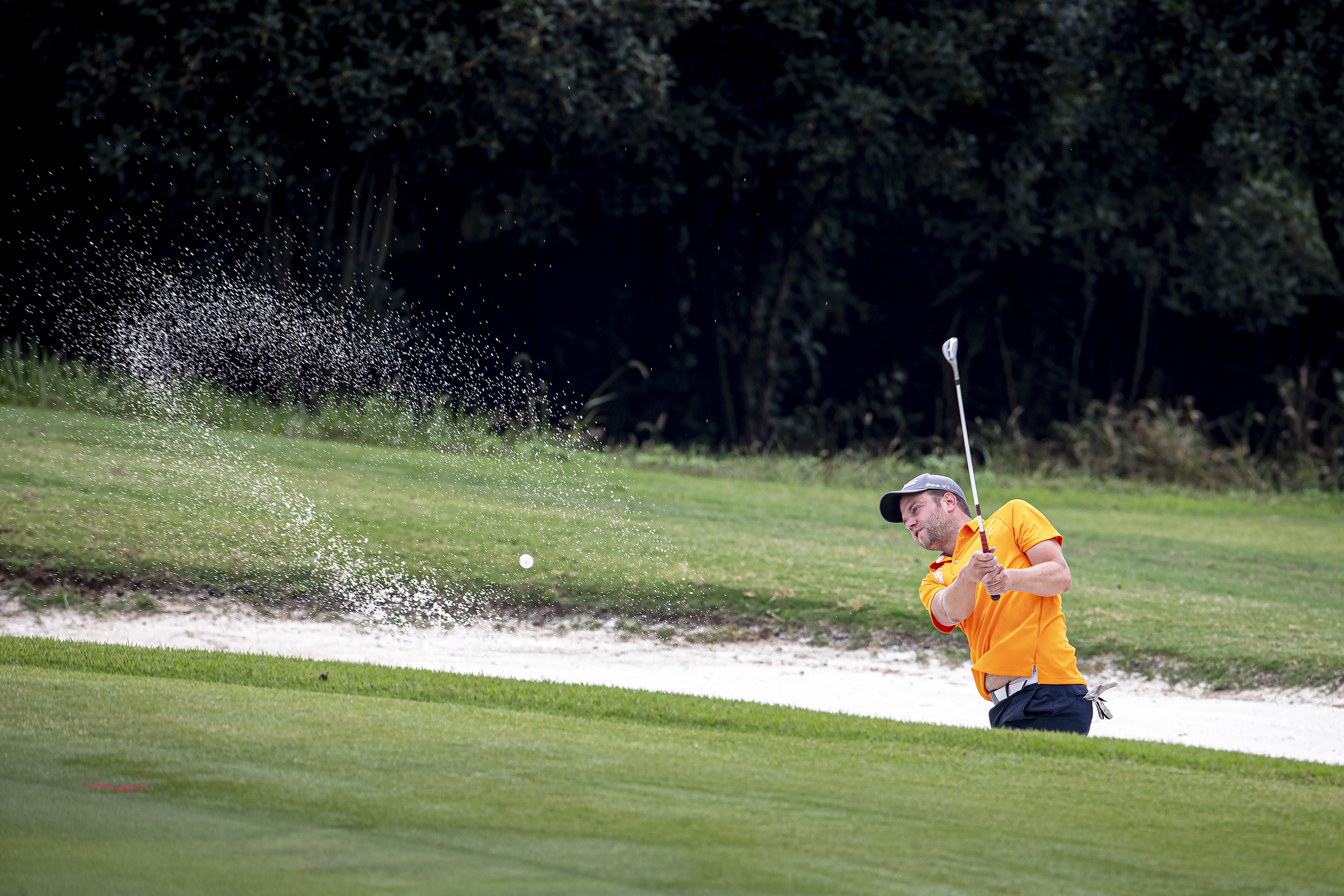 China, Wuhan, 23 oktober 2019.Militaire wereldspelen in China, van 17 tot 29 oktober.Ongeveer 10.000 atleten uit 105 landen (onder wie ca 160 Nederlanders) nemen deel aan dit evenement.Foto: Finale golf mannen.